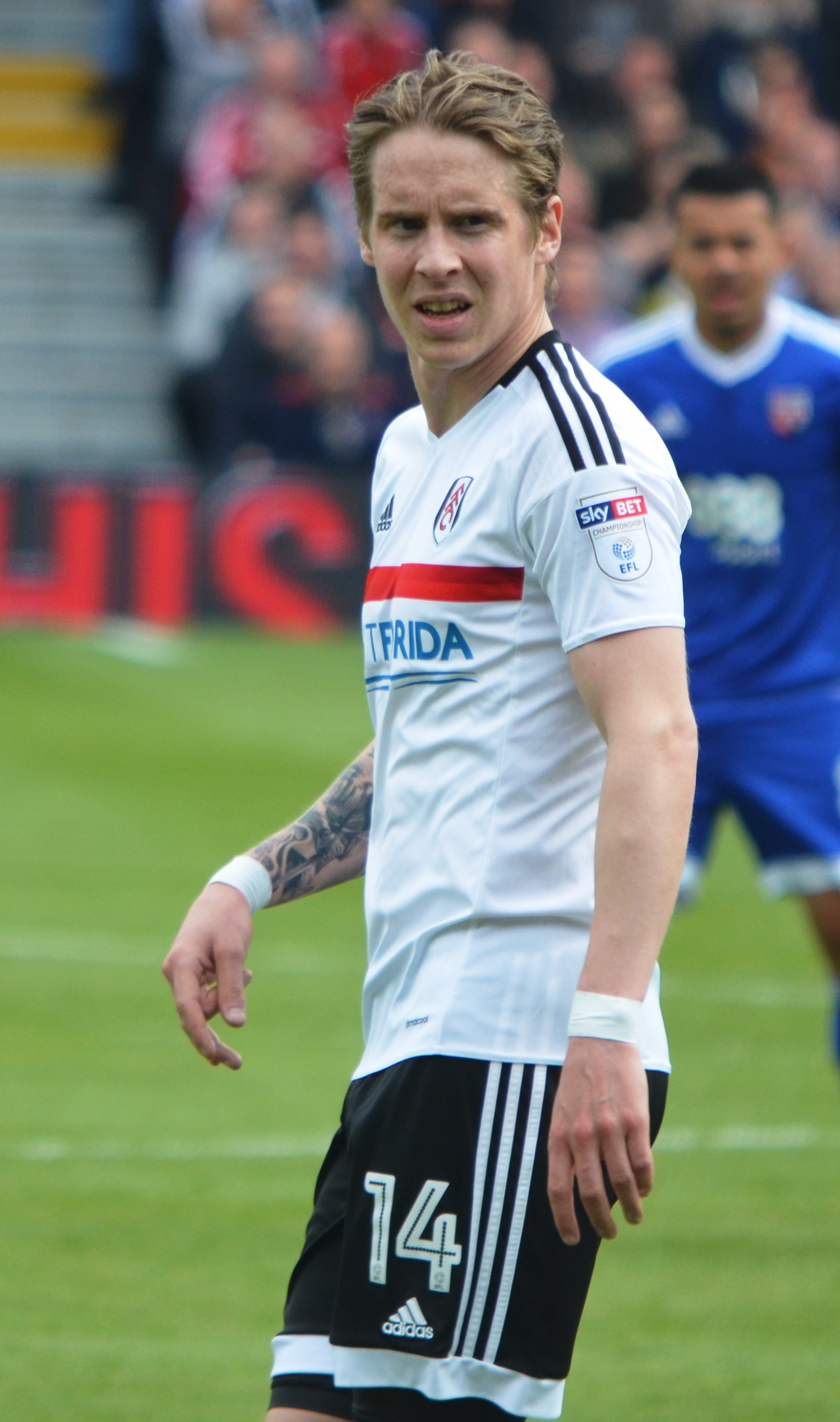 Stefan Johansen, Fulham